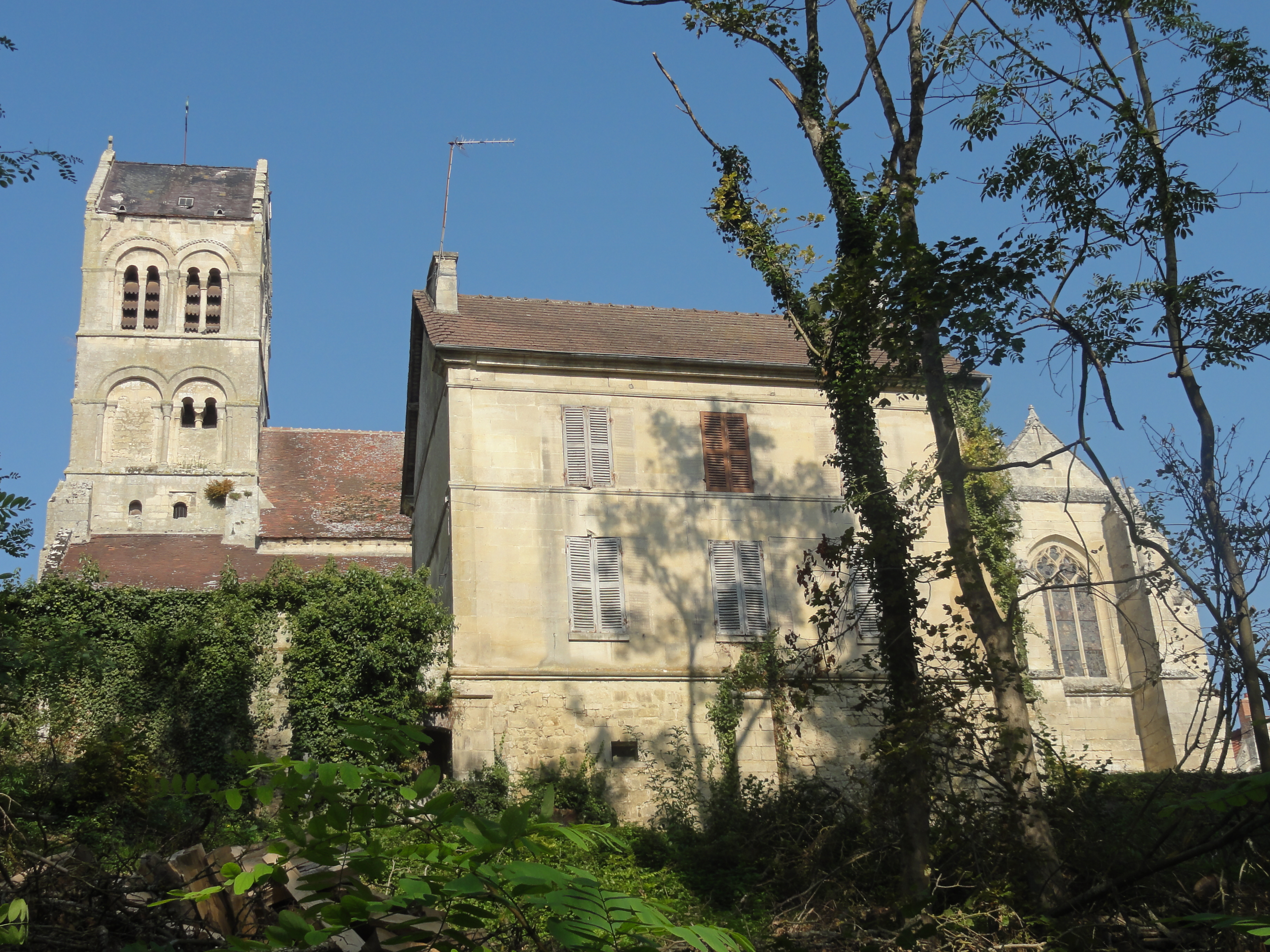 Église Saint-Rémi d'Orrouy - voir titre.